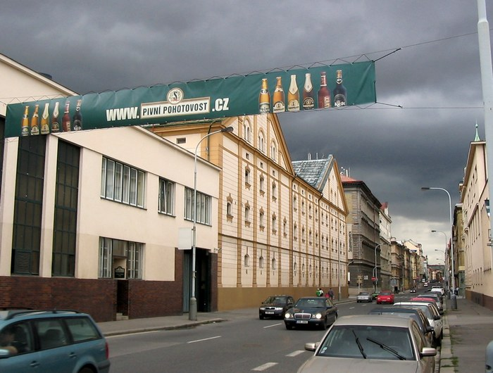 Praska dzielnica Smichov. Ulica Svornosti, przecinająca zabudowania browaru Staropramen